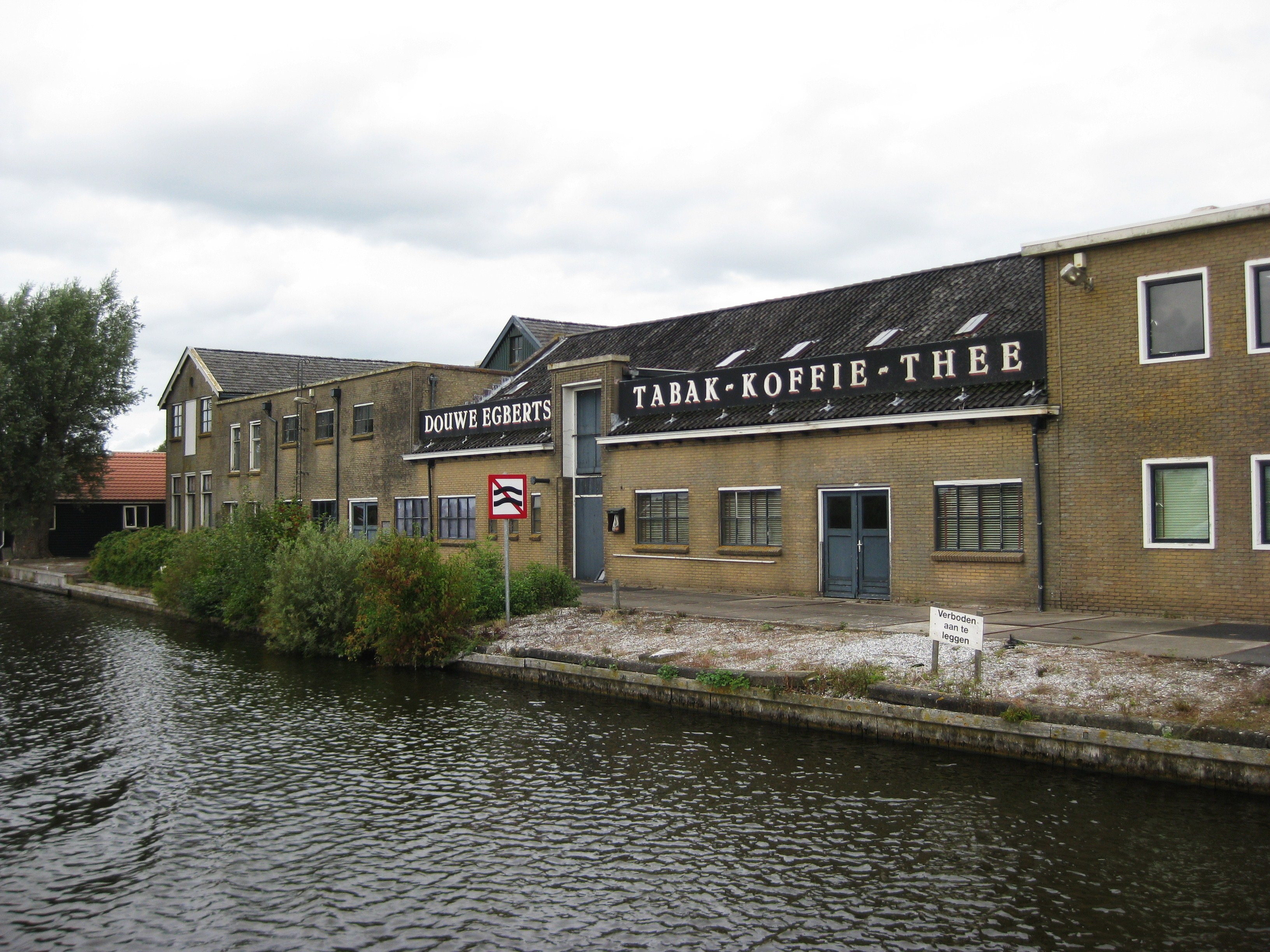 Het gebouw van de oorspronkelijke Douwe Egbertsfabriek in Joure, Friesland